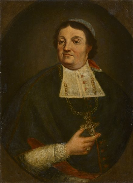 Беларуская (тарашкевіца): Міхал Ян Зянковіч